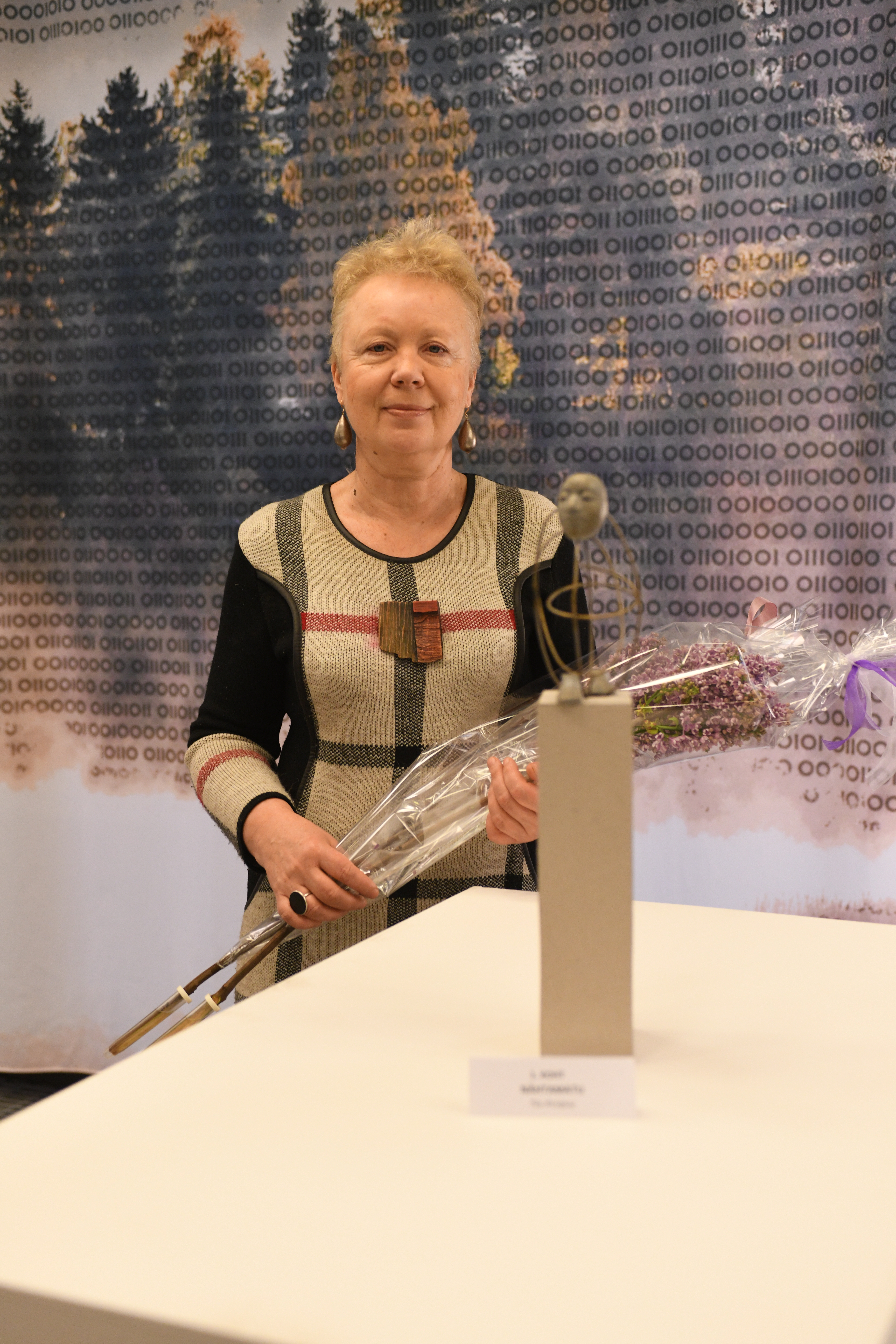 Tiiu Kirsipuu, Rooma kunsti konkursi tööde näitus ja autasustamine